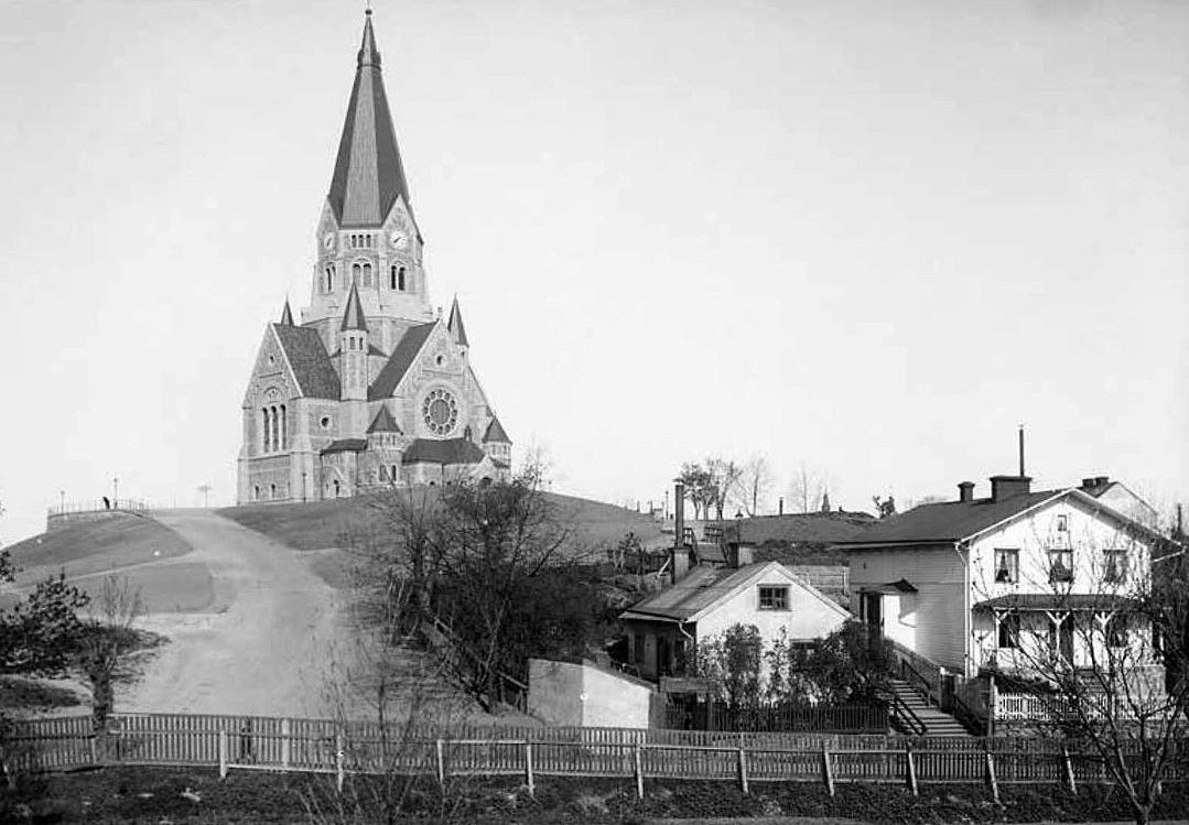 Stora Mejtens gränd 10 och 8 (t.h.) med Sofia kyrka i bakgrunden